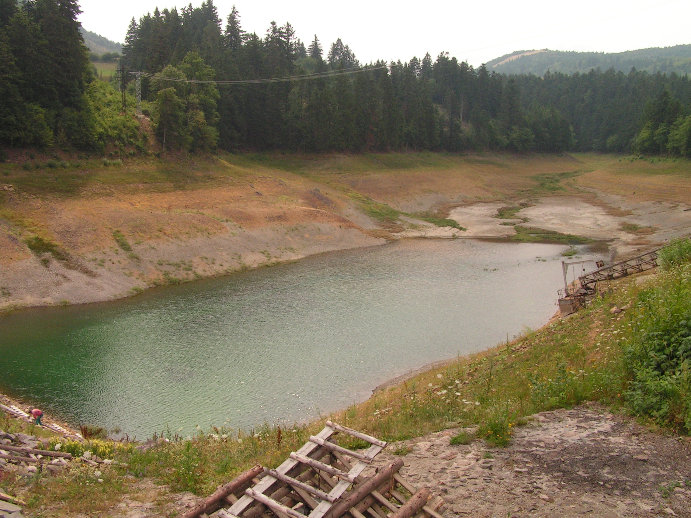 Takmer úplne vypustený tajch Rozgrund